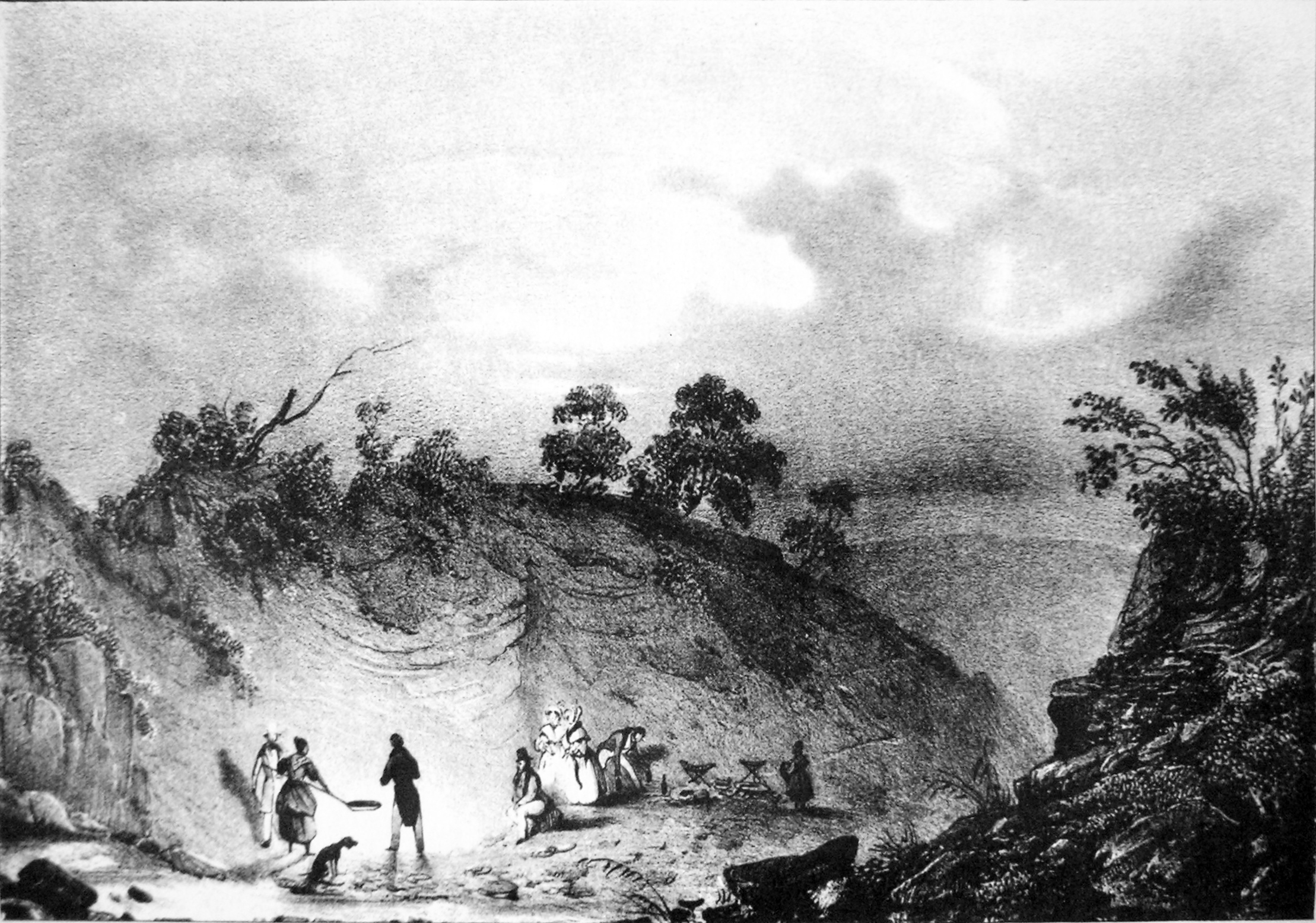 La fontaine ardente (Isère)ATTENTION ! Ce facsimilé est réalisé en applicant des alterations avec un logiciel graphique à une copie numérique, obtenue à partir d'une prise de photo faite par un non-professionnel. Elle pourrait ne pas être parfaitement réussie.